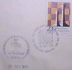 Briefsache mit Sonderstempel der Schacholympiade 1978 in Buenos Aires.